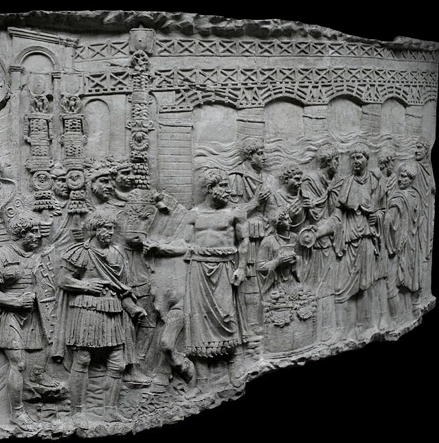 Moulage de la frise de la colonne Trajane, exposé au Museo della Civiltà Romana, Rome. Détail : Scène XCIX, Pont sur le Danube